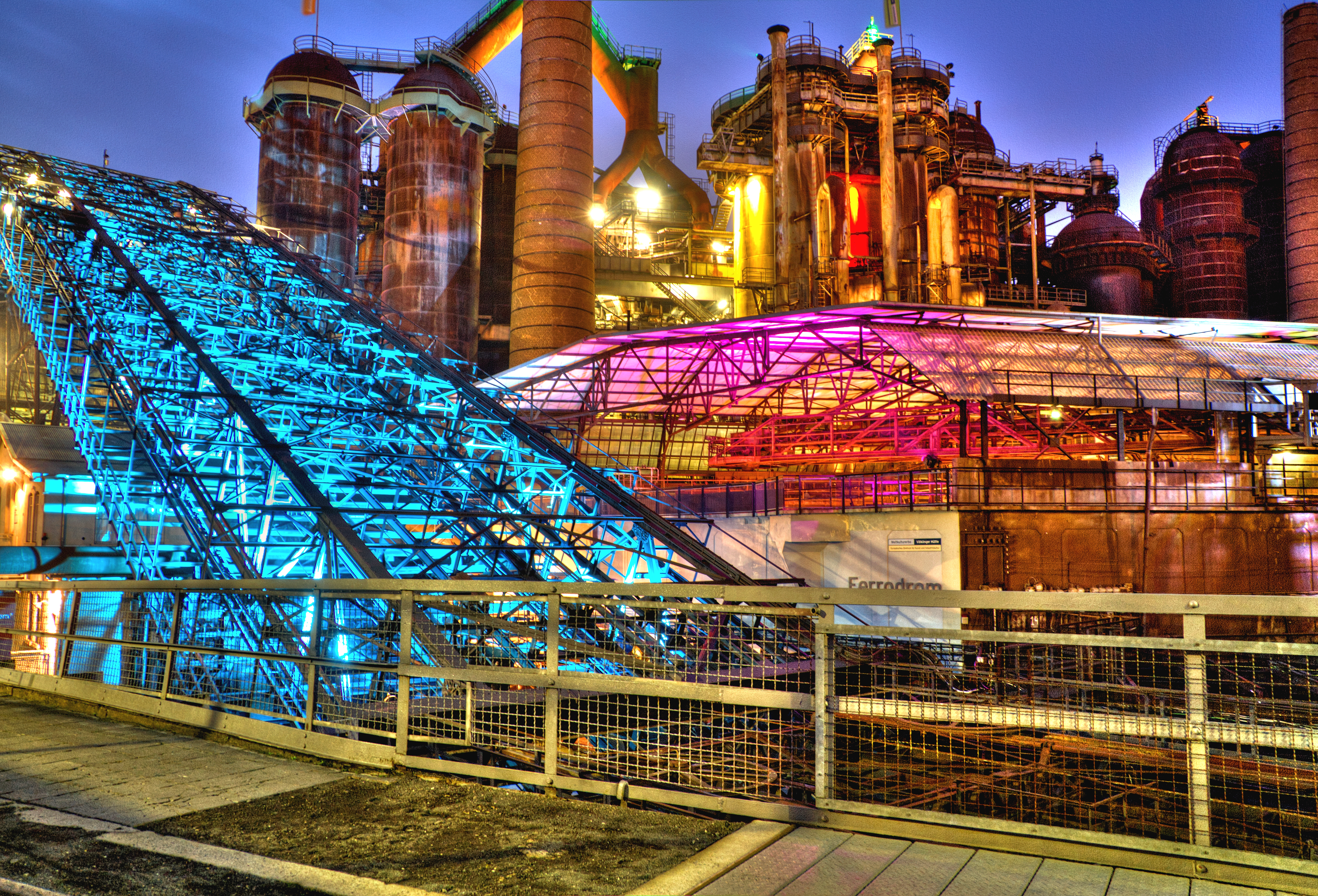 November 2011, HDR